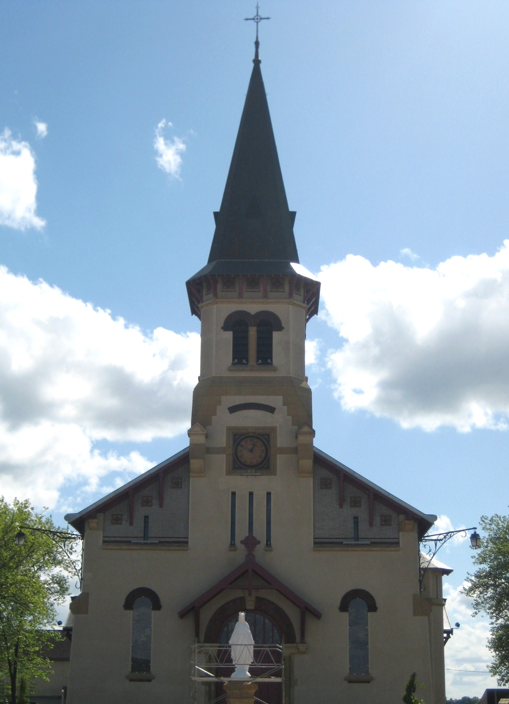 Description Église Notre Dame de Franchepré de JoeufDate 18 May 2009Source mon appareil photoAuthor Aimelaime Église Notre Dame de Franchepré de Joeuf